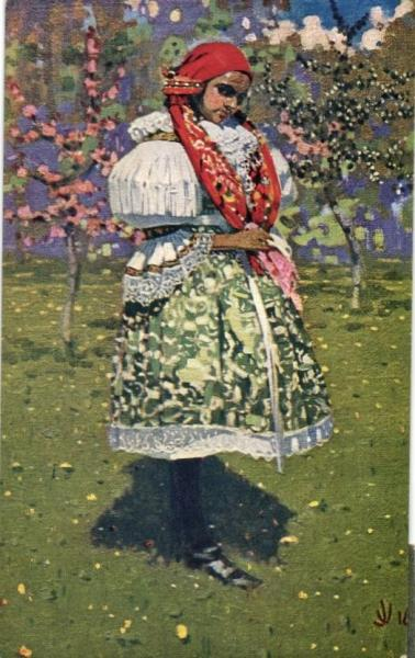 Obrázky Jožy Uprky na pohlednicích